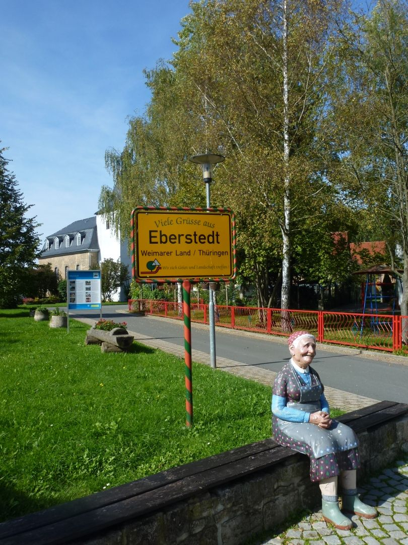 Plastik in Eberstedt, im Hintergrund die Dorfkirche